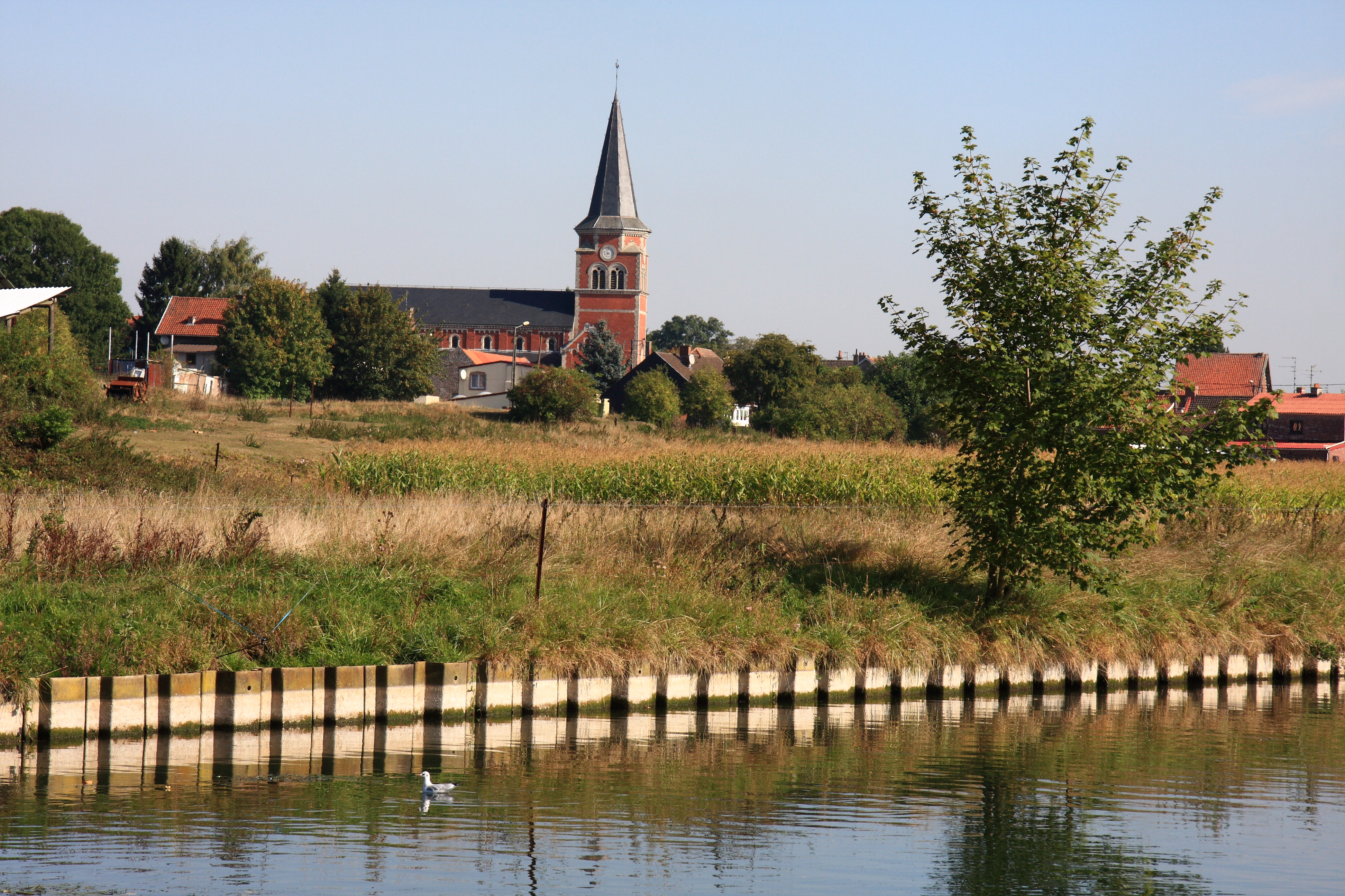 Le village de Rœux au bord de la Scarpe